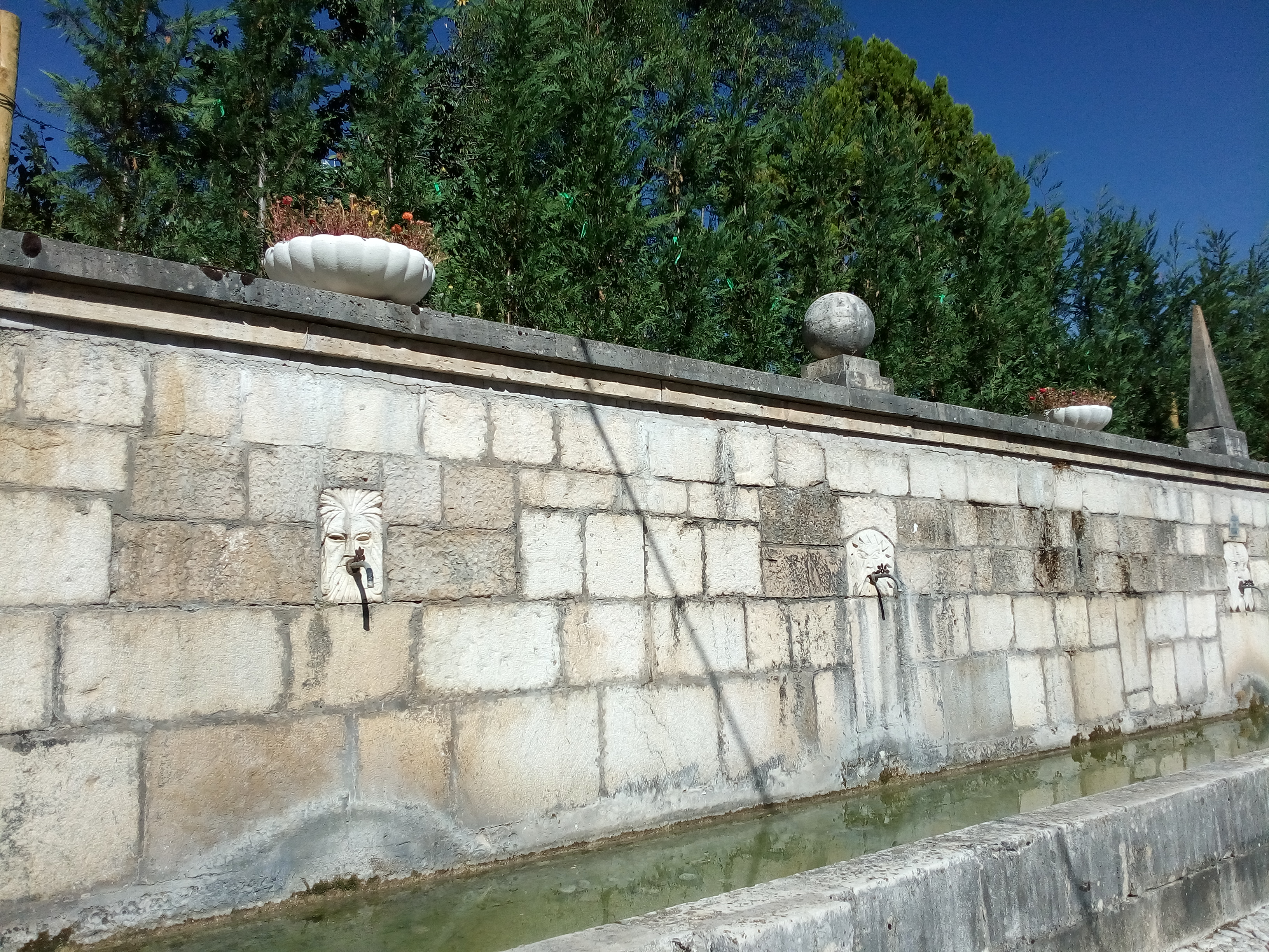 Fonte Vecchia, Collelongo, Abruzzo